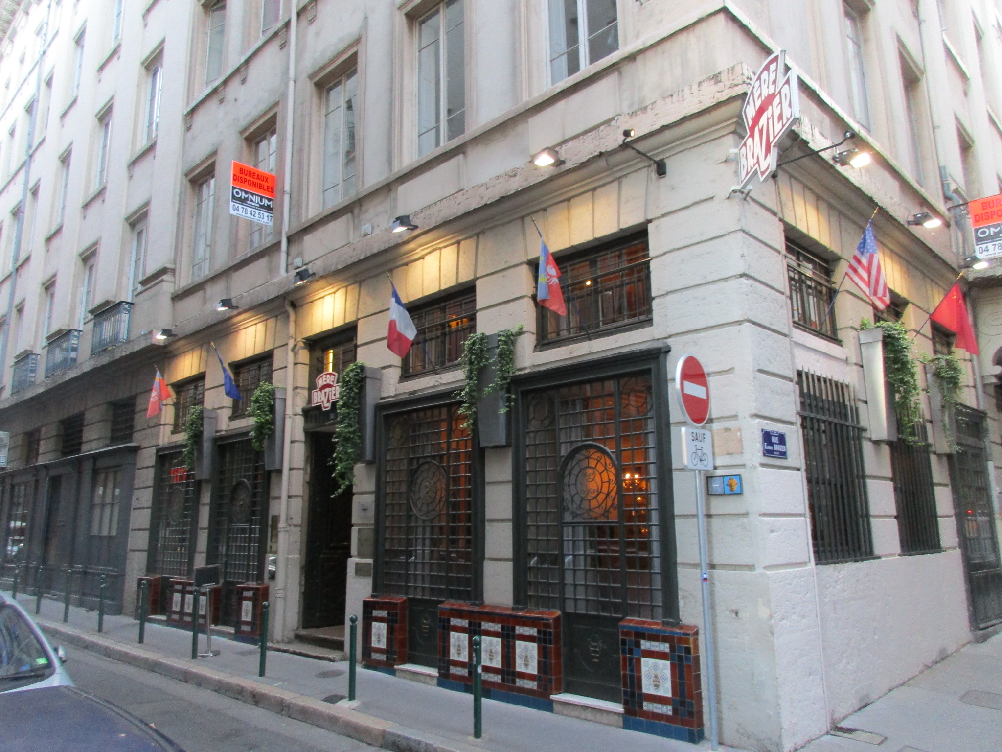 Restaurant Mère Brazier, 12 rue Royale à Lyon ( intersection de la rue Royale et de la Rue Eugénie Brazier